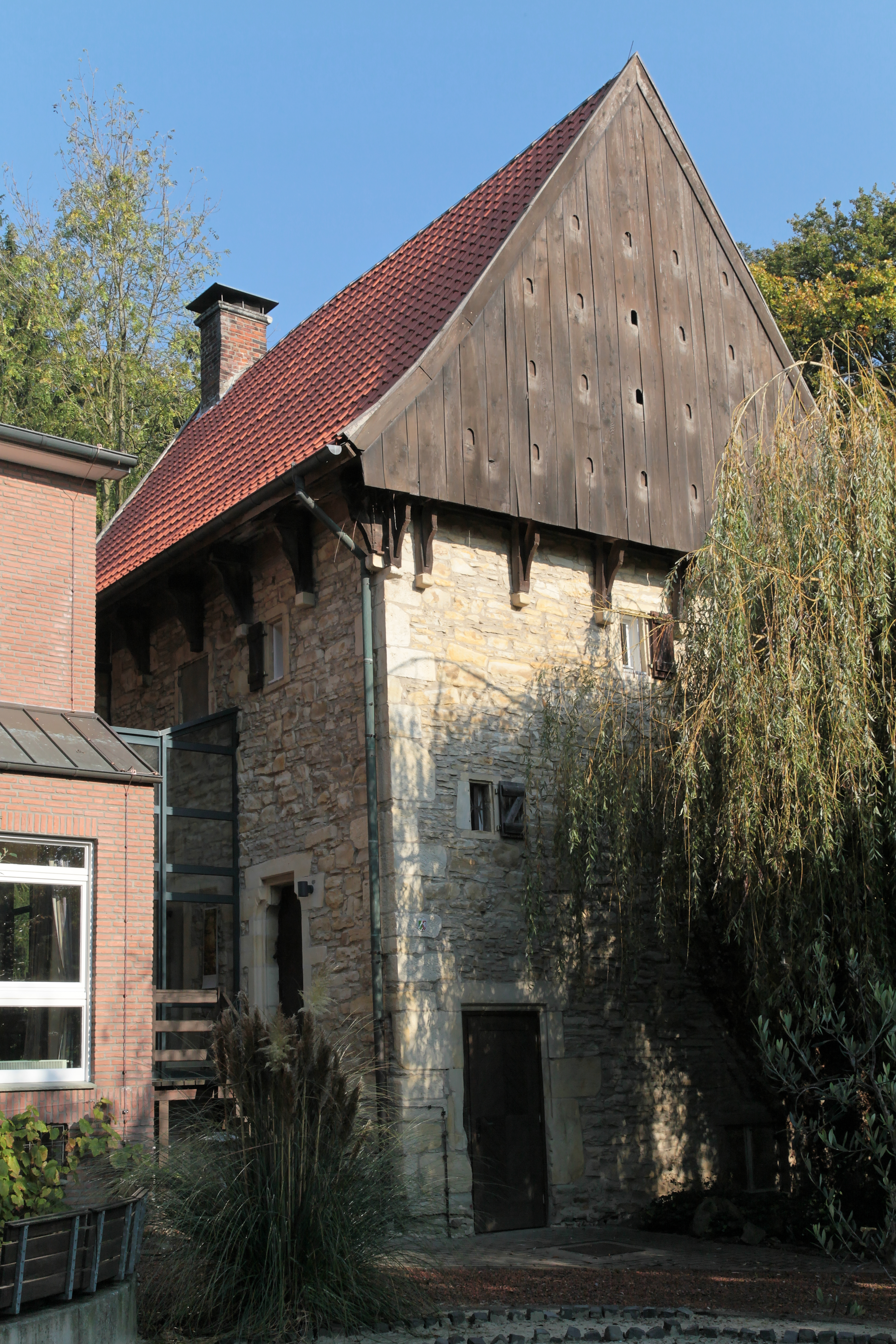 Speicher des ehemaligen Pröbstinghofes am St. Franziskus-Haus, Pröbstingstraße 22 in Nordwalde